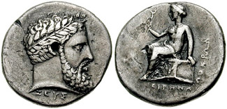 Монета от Локри, 375 пр.н.е.